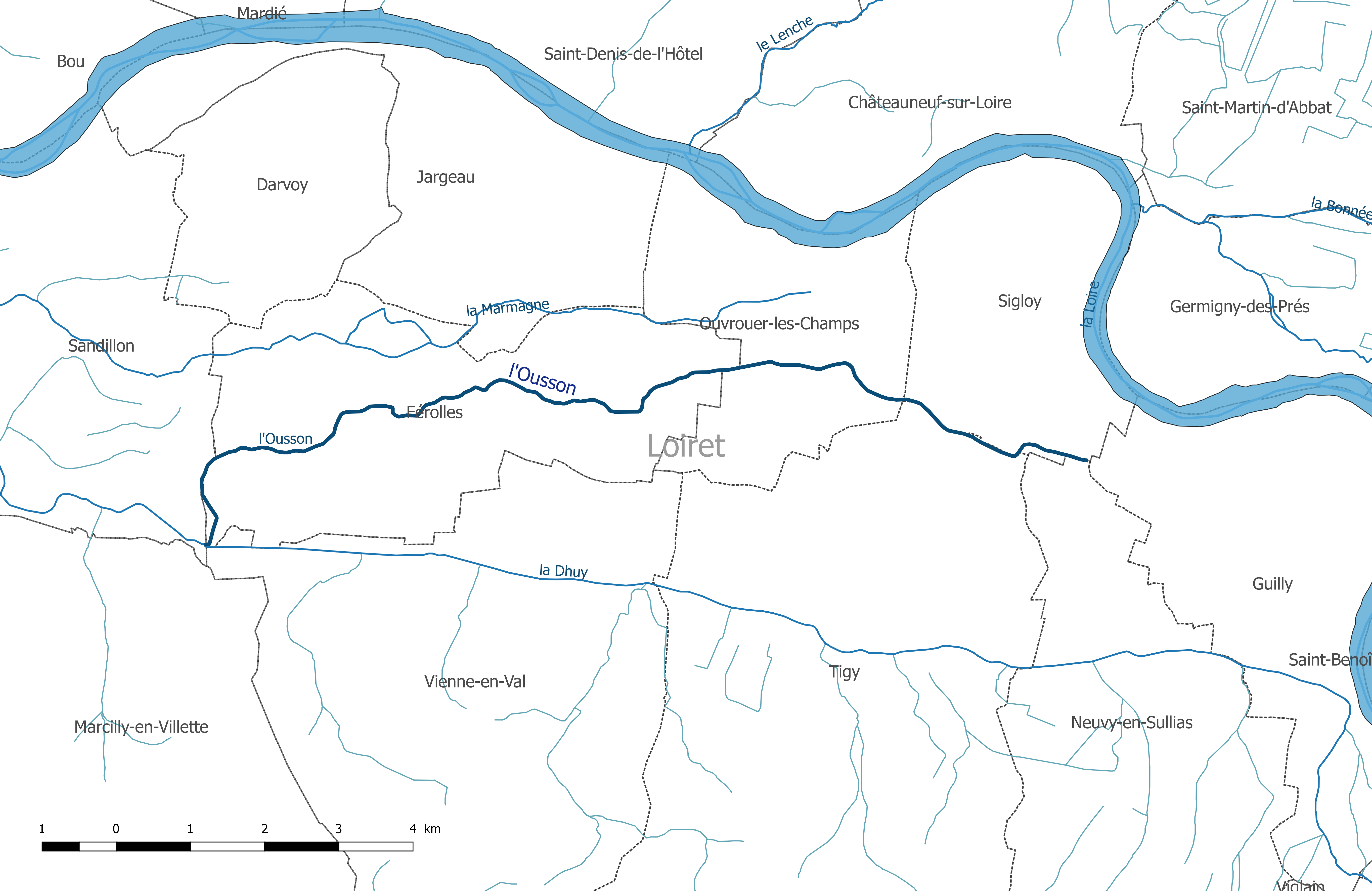 Carte des cours d'eau "l'Ousson" et "le Dhuy", dans le département du Loiret.